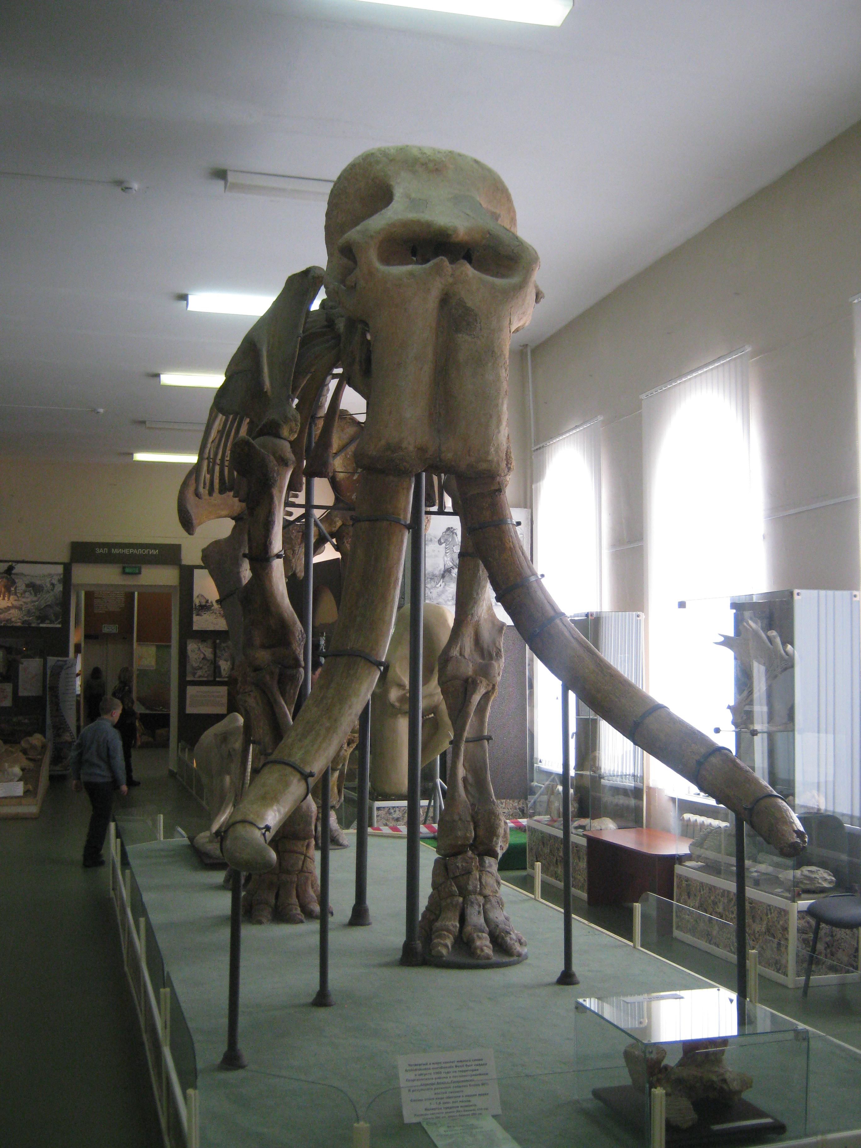 Скелет южного мамонта выставленный в экспозициях Ставропольского краеведческого музея. 1 экспонат.